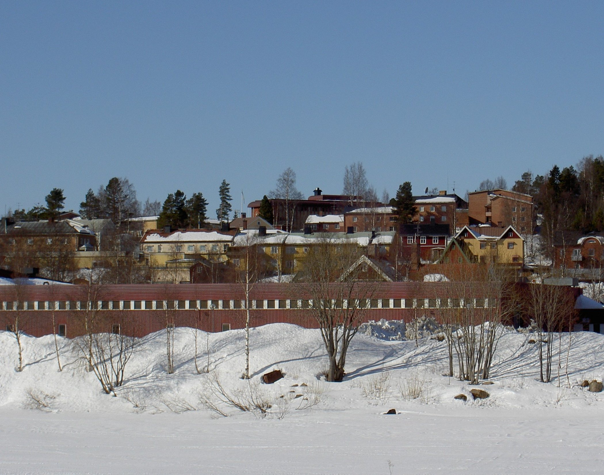 Övertorneå (Matarengi) från Mikkolansaari vårvinter 2012